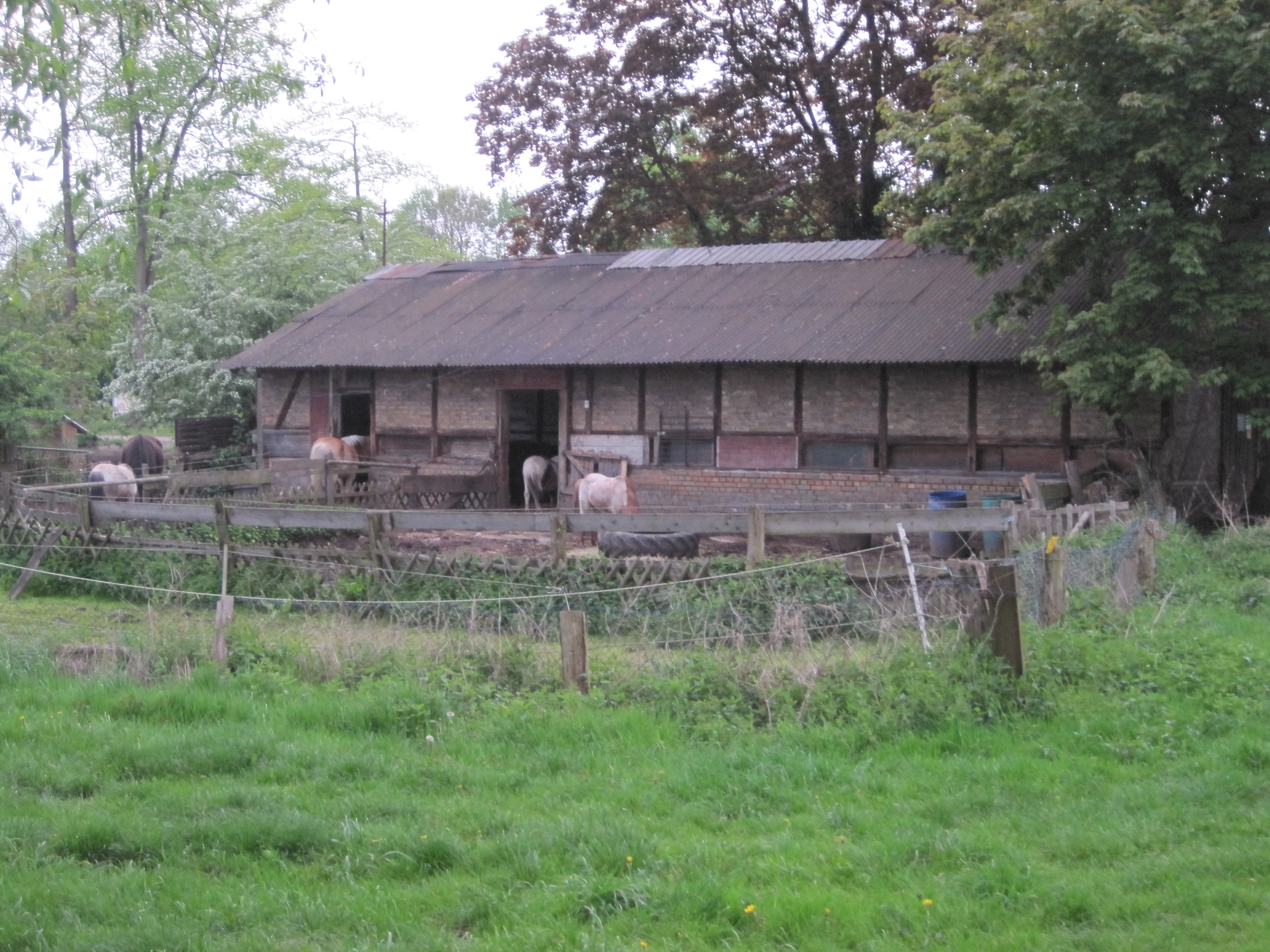 Dieses Foto zeigt den Reitstall "Ute's kleine Farm" im Eingangsbereich des Burghügels zur Mark in Hamm.